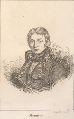 Jean-Charles Monnier (1758-1816), général de division en 1800, par Réville.